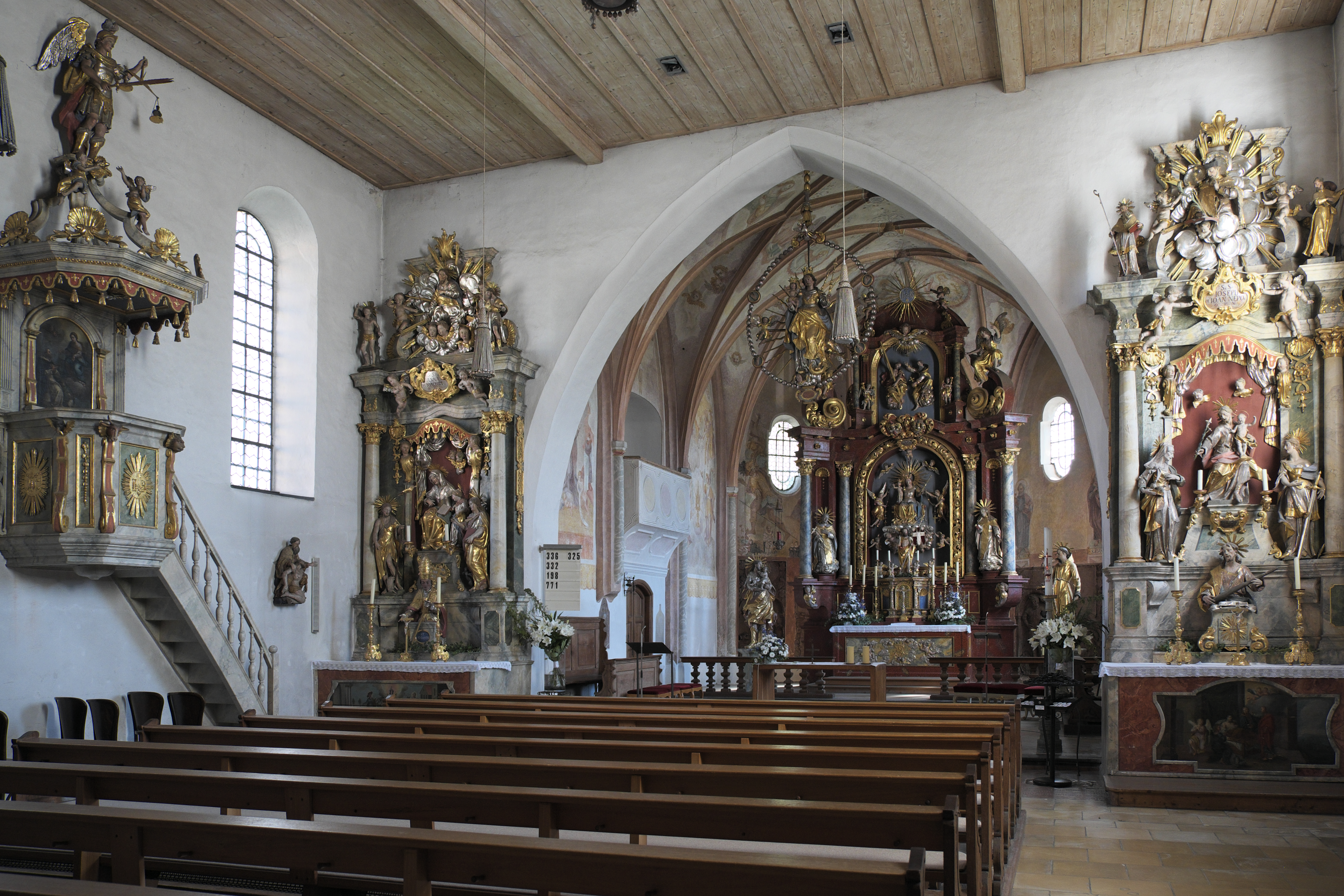 Katholische Filialkirche Unsere Liebe Frau in Gauting im Landkreis Starnberg (Bayern, Deutschland), Innenraum